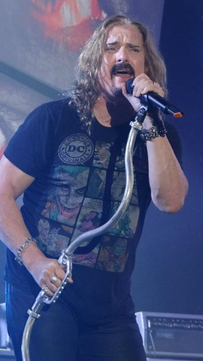 James LaBrie en 2012, durante un concierto de Dream Theater.